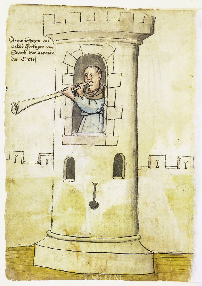 N.N. Turner (Durner; Türmer; Türner) , Turner (Türmer) Transkription und weitere Informationen